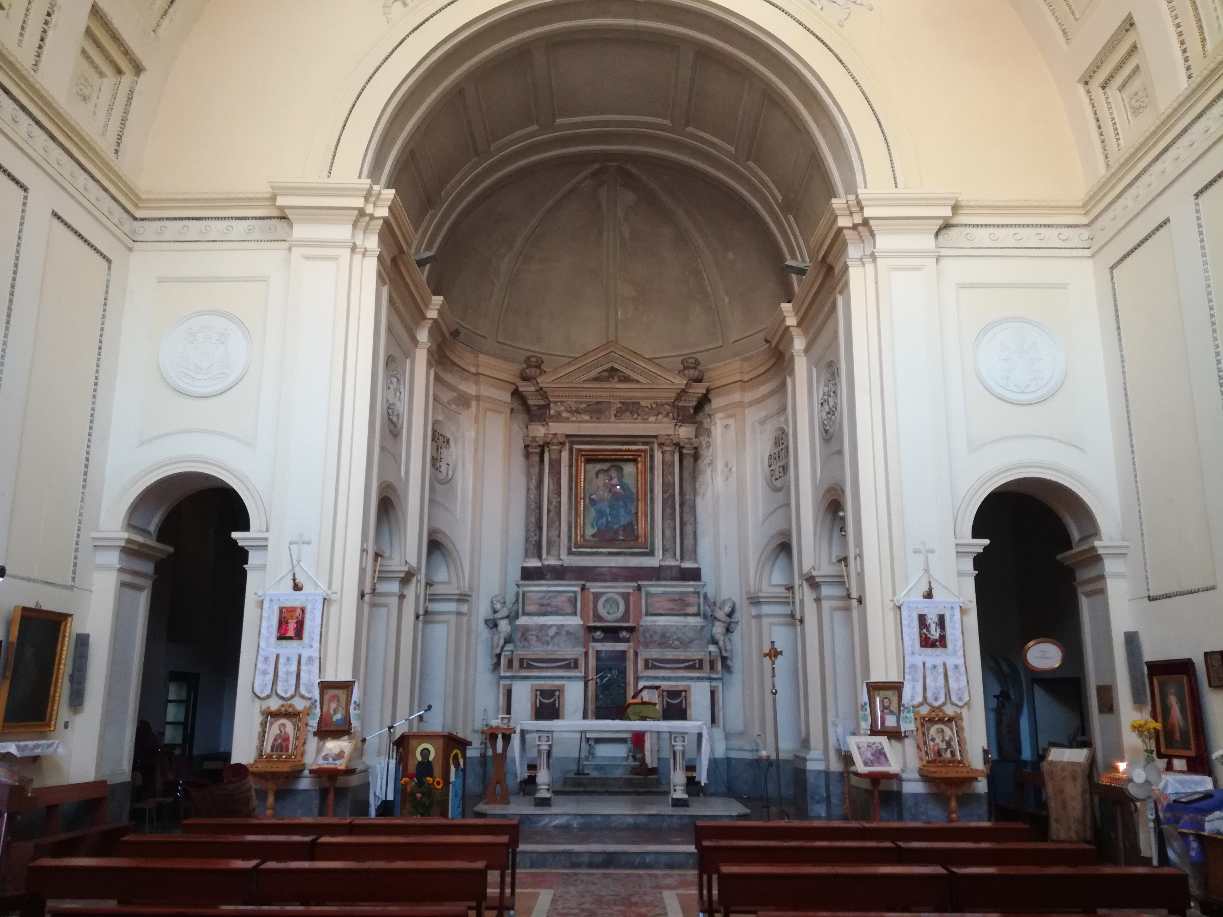 Interno Santa Maria delle Grazie a Piazza Cavour (Napoli)